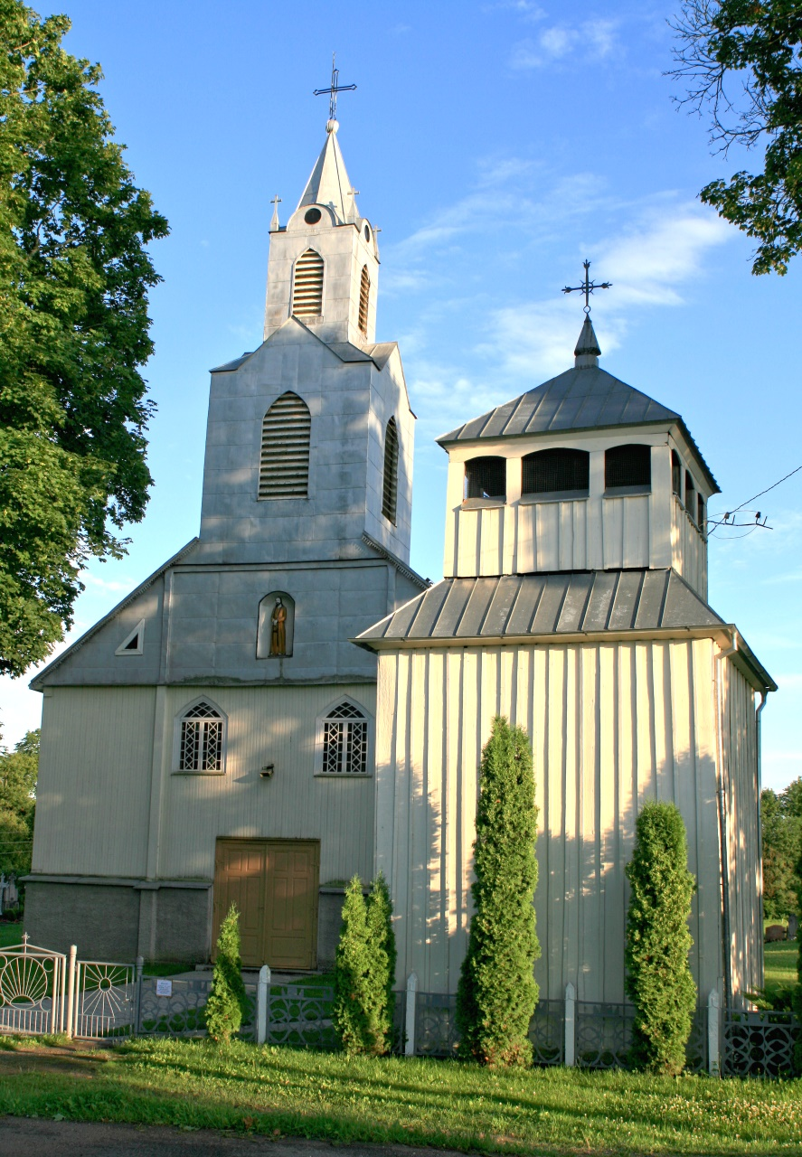 Girdžių Šv. Marijos Magdalietės bažnyčia. Šios nuotraukos autorius E. Giedraitis leidžia naudoti nuotrauką be apribojimų, taip pat ir komerciniais tikslais